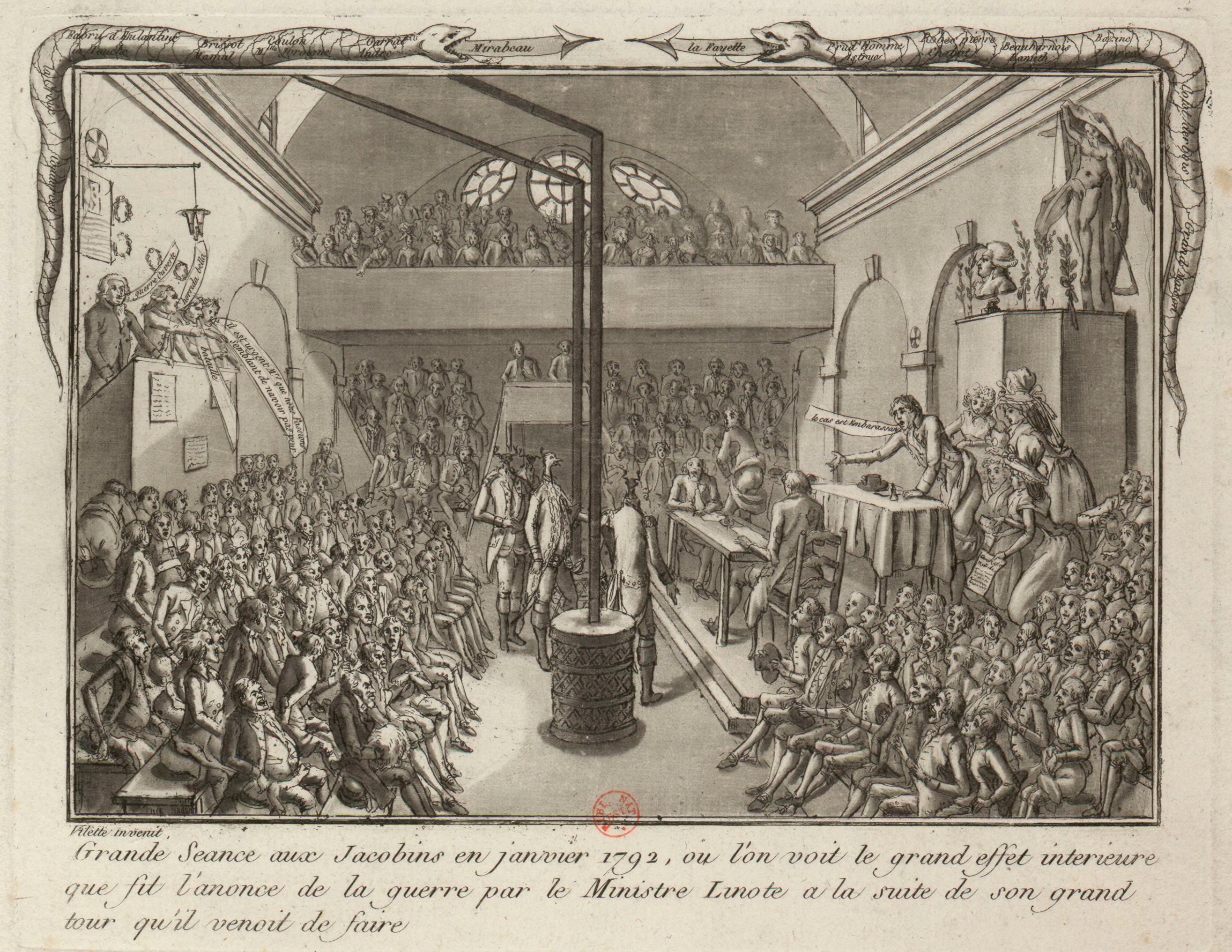 Grande seance aux Jacobins en janvier 1792 : ou l'on voit le grand effet interieure que fit l'anonce de la guerre par le ministre Linote a la suite de son grand tour qu'il venait de faire. Estampe anonyme, 1792.